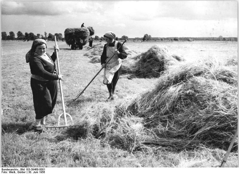 Rogäsen, Heuernte Zentralbild Weiß Wei-Sch. 30.6.1956 Heuernte im Fiener Bruck, Bez. Potsdam. UBz: Heuernte auf den Weiden des Bauern Pflege in Rogäsen, Kreis Brandenburg.